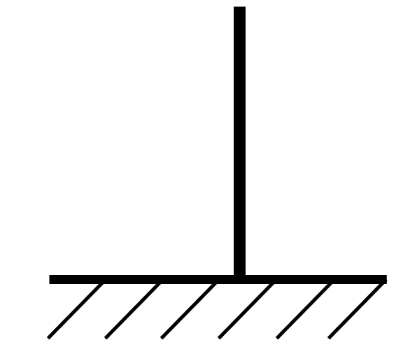 Public Domain, selbst gezeichnet --Magnus Manske